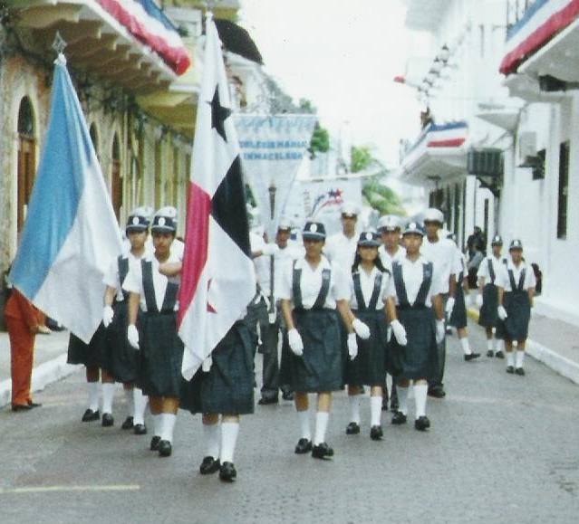 Colocación de la bandera nacional en un desfile. Ejemplo de Colgadura con los colores de la bandera de Panamá.